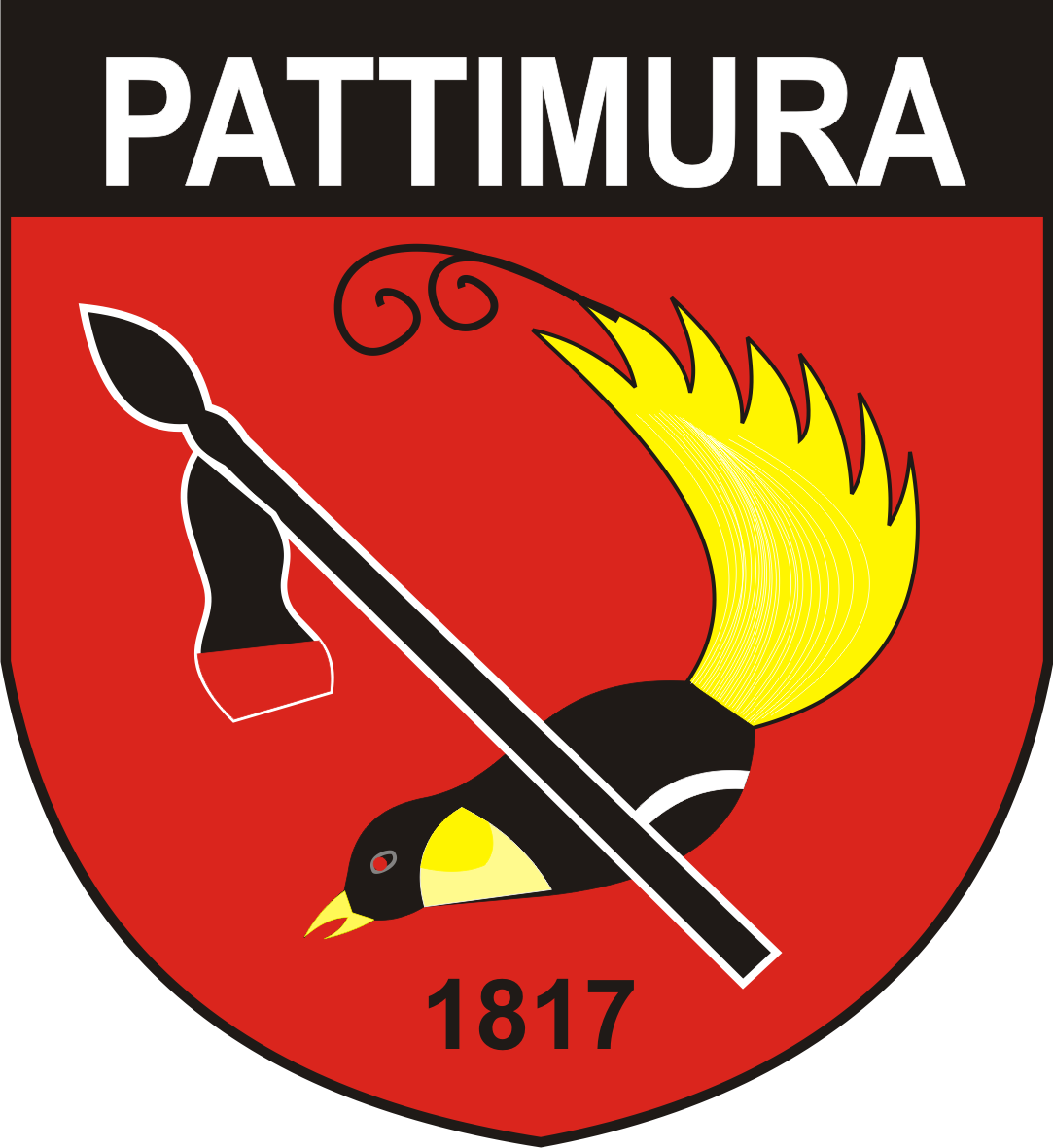 Gambar ini adalah Lambang Kodam XVI Pattimura